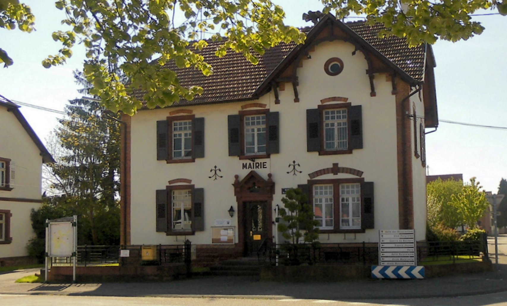 La mairie de Riedseltz